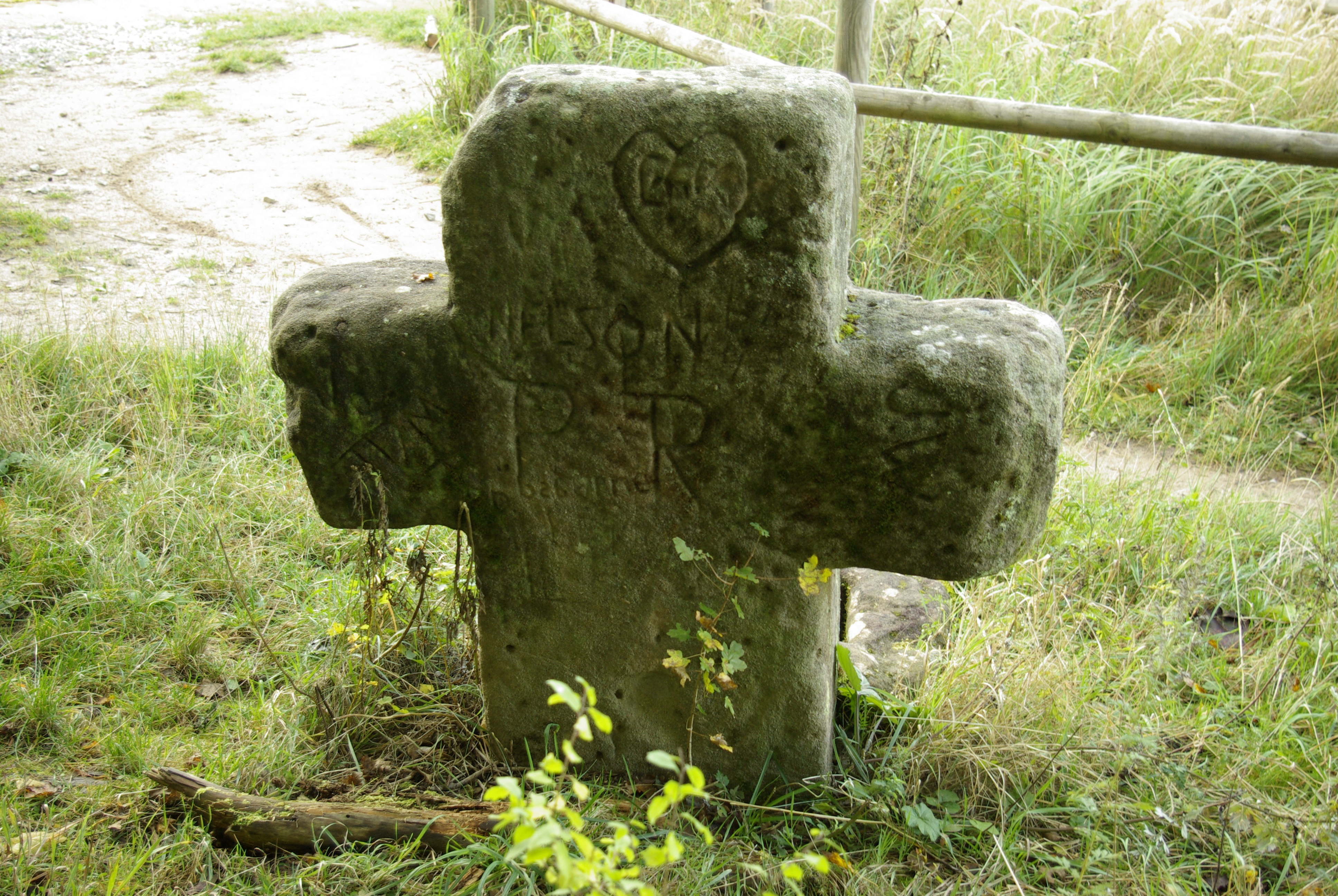 Das Weiße Kreuz, auch Hirschlecke genannt, im Tennenloher Forst im Landkreis Erlangen-Höchstadt. Nicht zu verwechseln mit der weiter nördlich befindlichen Hirschlecke im Buckenhofer Forst.